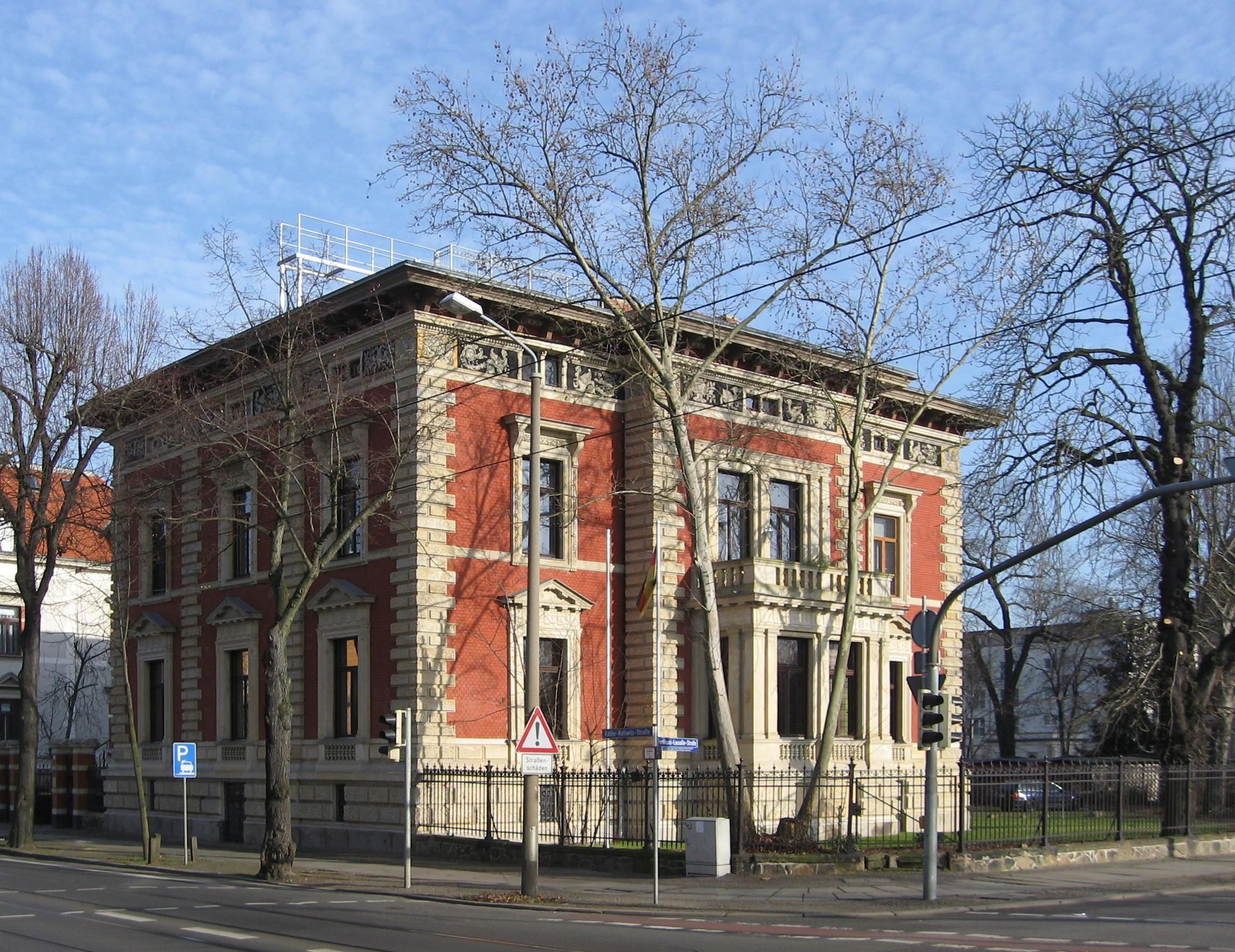 Wohnhaus Herrmann Julius Meyer, Lepzig, Käthe-Kollwitz-Straße 115 (erbaut 1885 von Max Pommer)